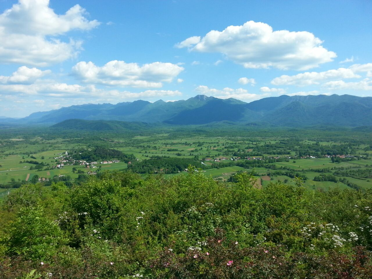 Pogled na Lički Novi sa Oštre 3. lipnja 2017.